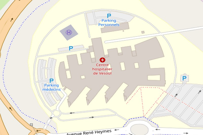 Carte du centre hospitalier de Vesoul 2